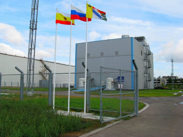 ГТ ТЭЦ г. Сасово